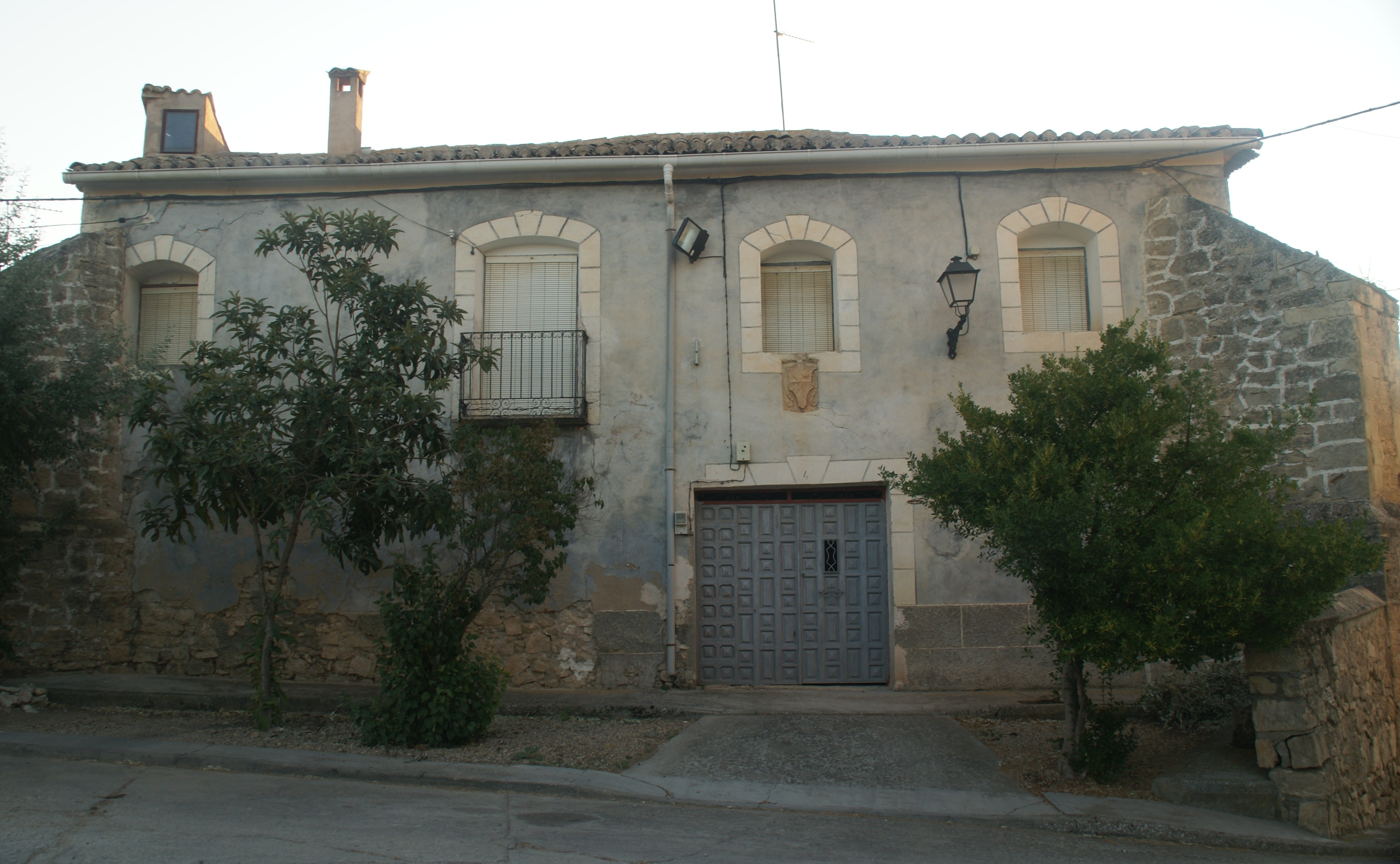 Casa Rectoral (La Frontera, Cuenca)